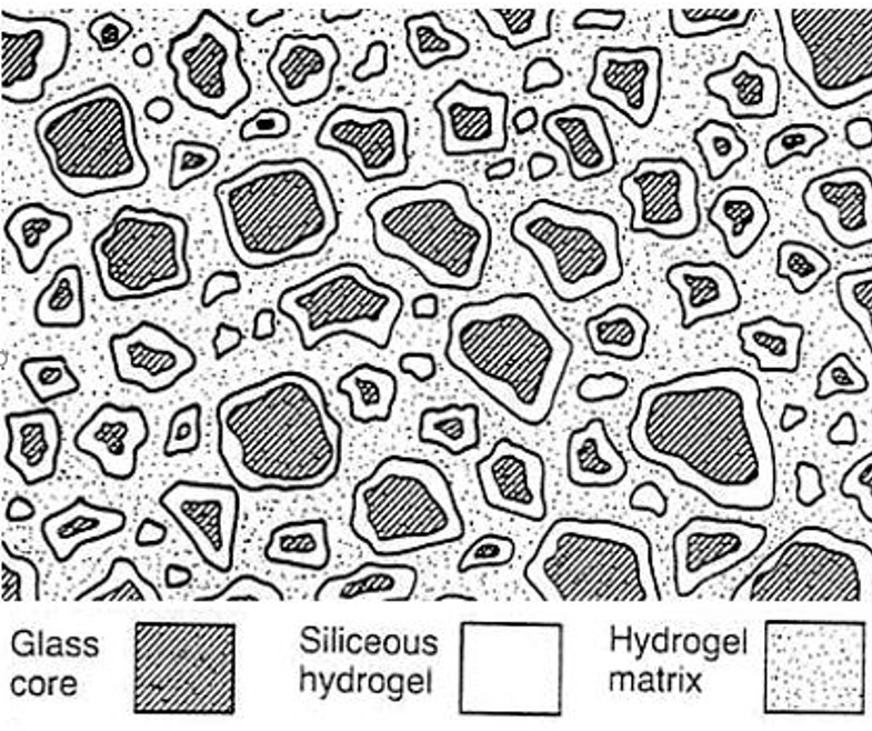 ریزساختار یک سیمان گلاس آینومر معمولی